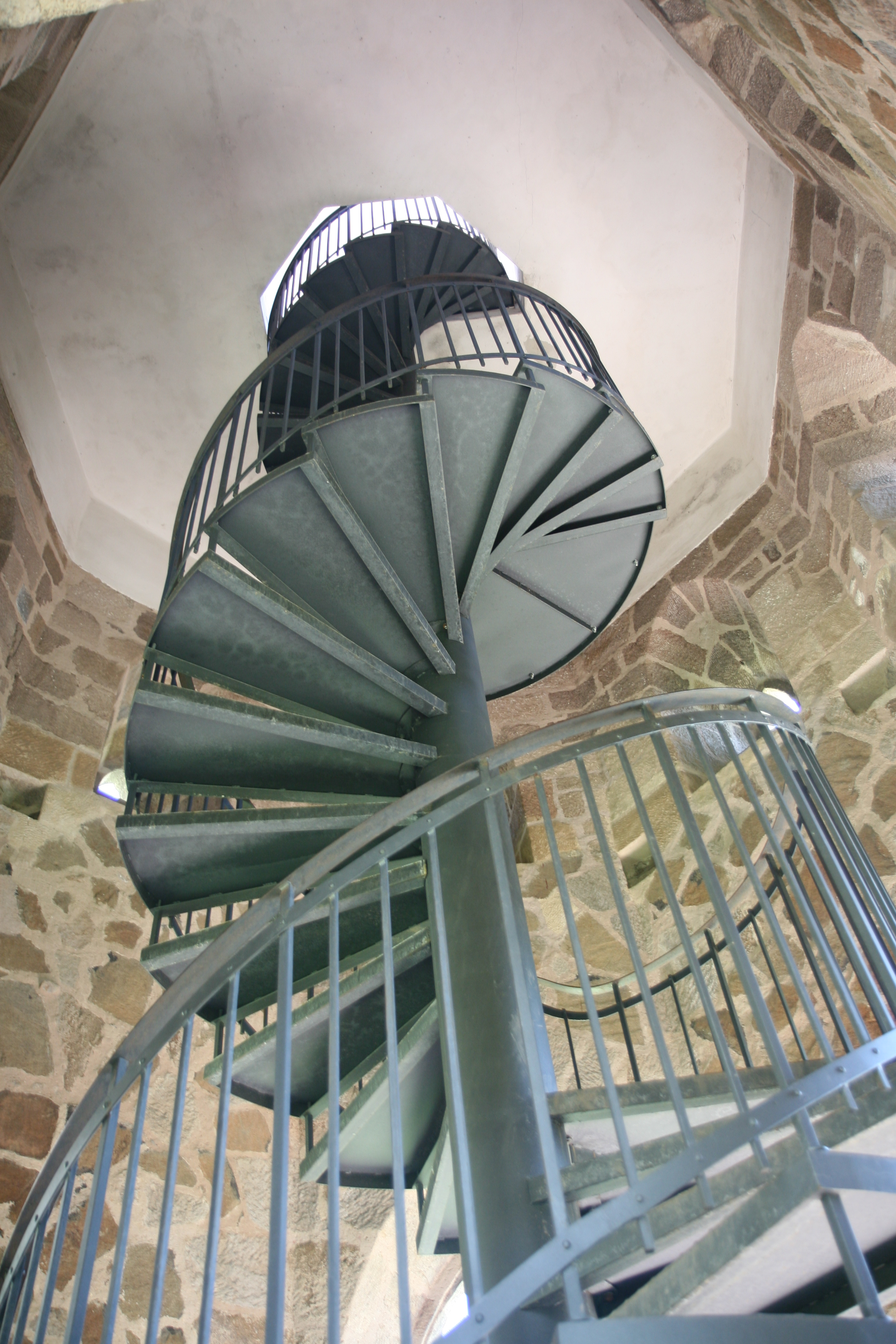 Schody